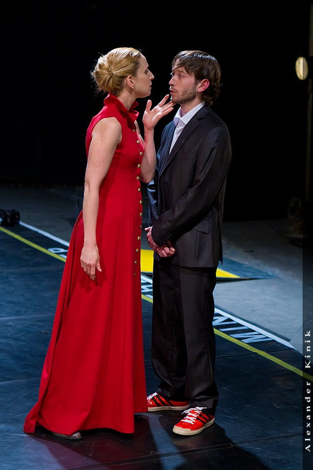 עם אלחי לויט ודיוויד לוינסקי